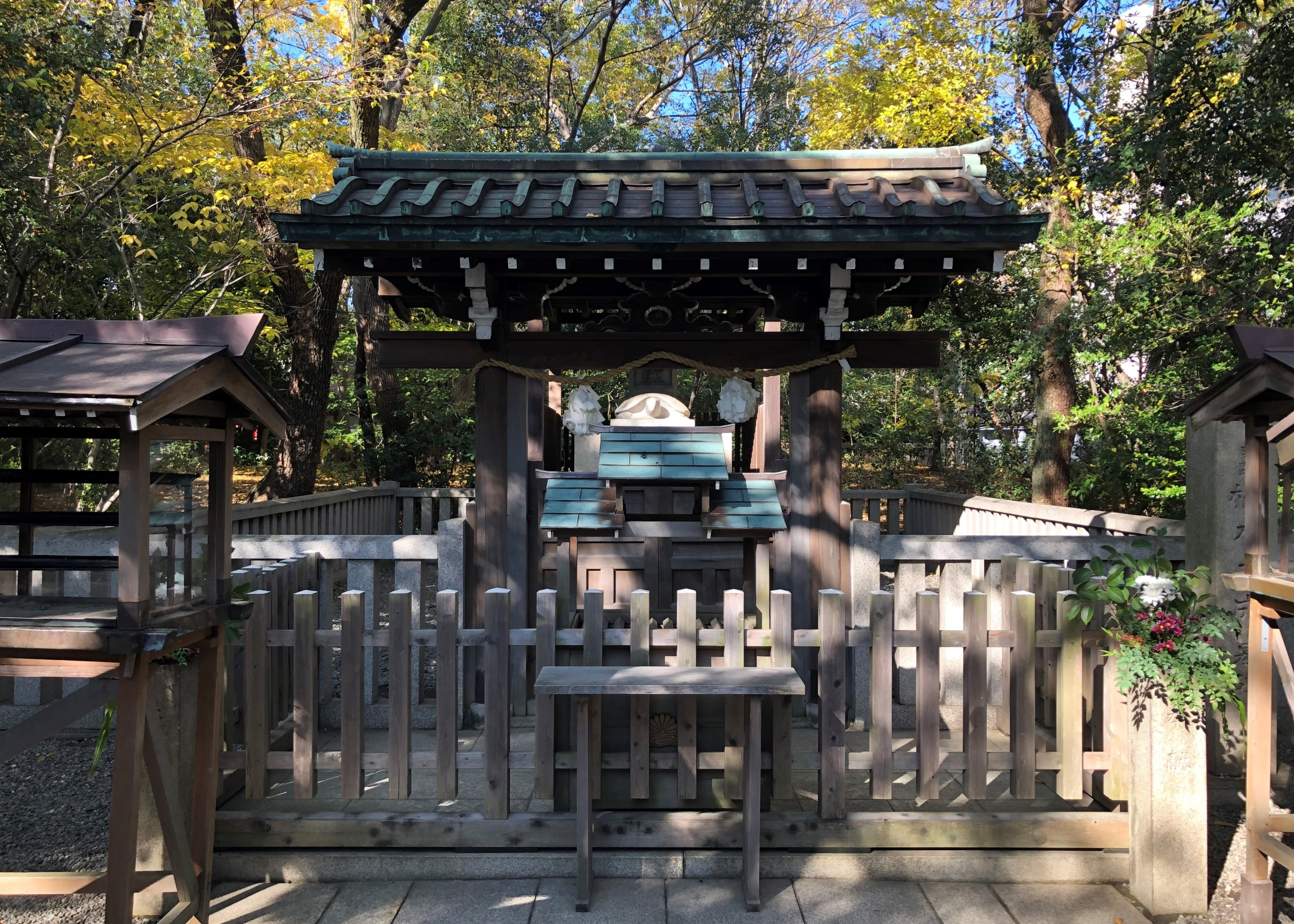 湊川神社の楠公墓所